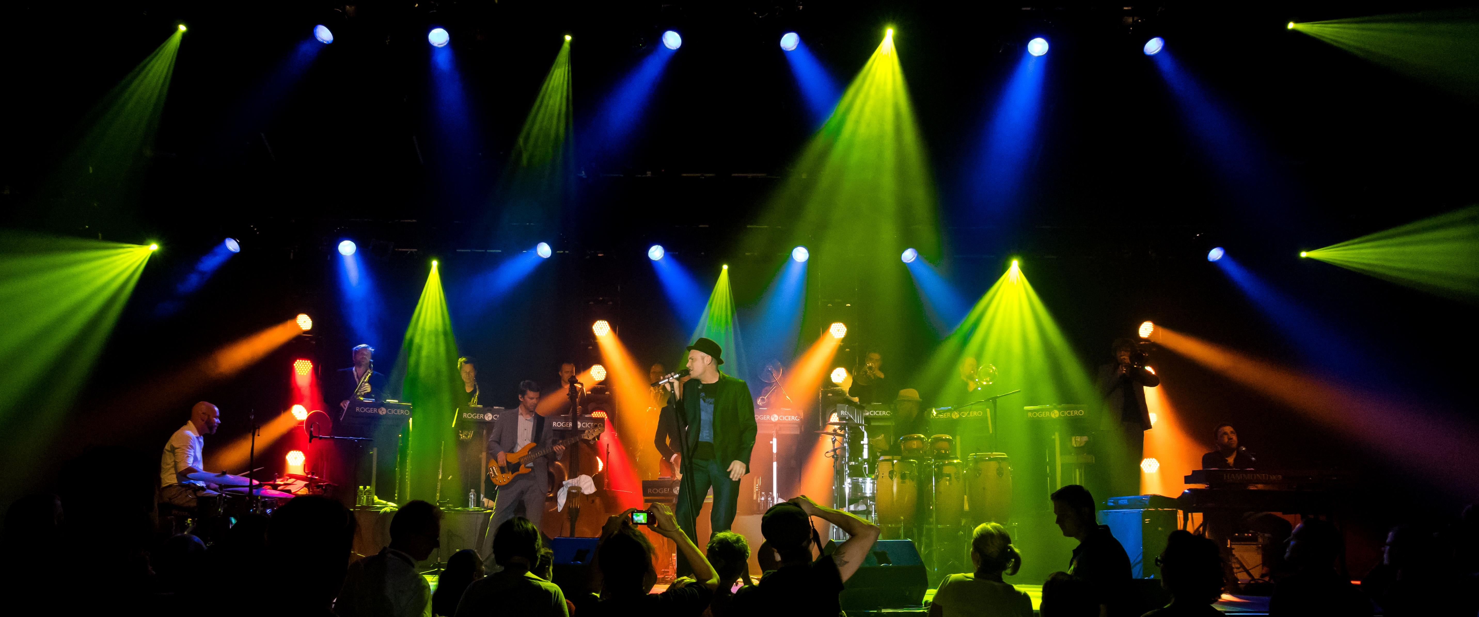 Das Zelt Musik Festival 2014 in Freiburg im Breisgau (16.07.2014 - 03. 08.2014) 22.07.2014 Roger Cicero & Band